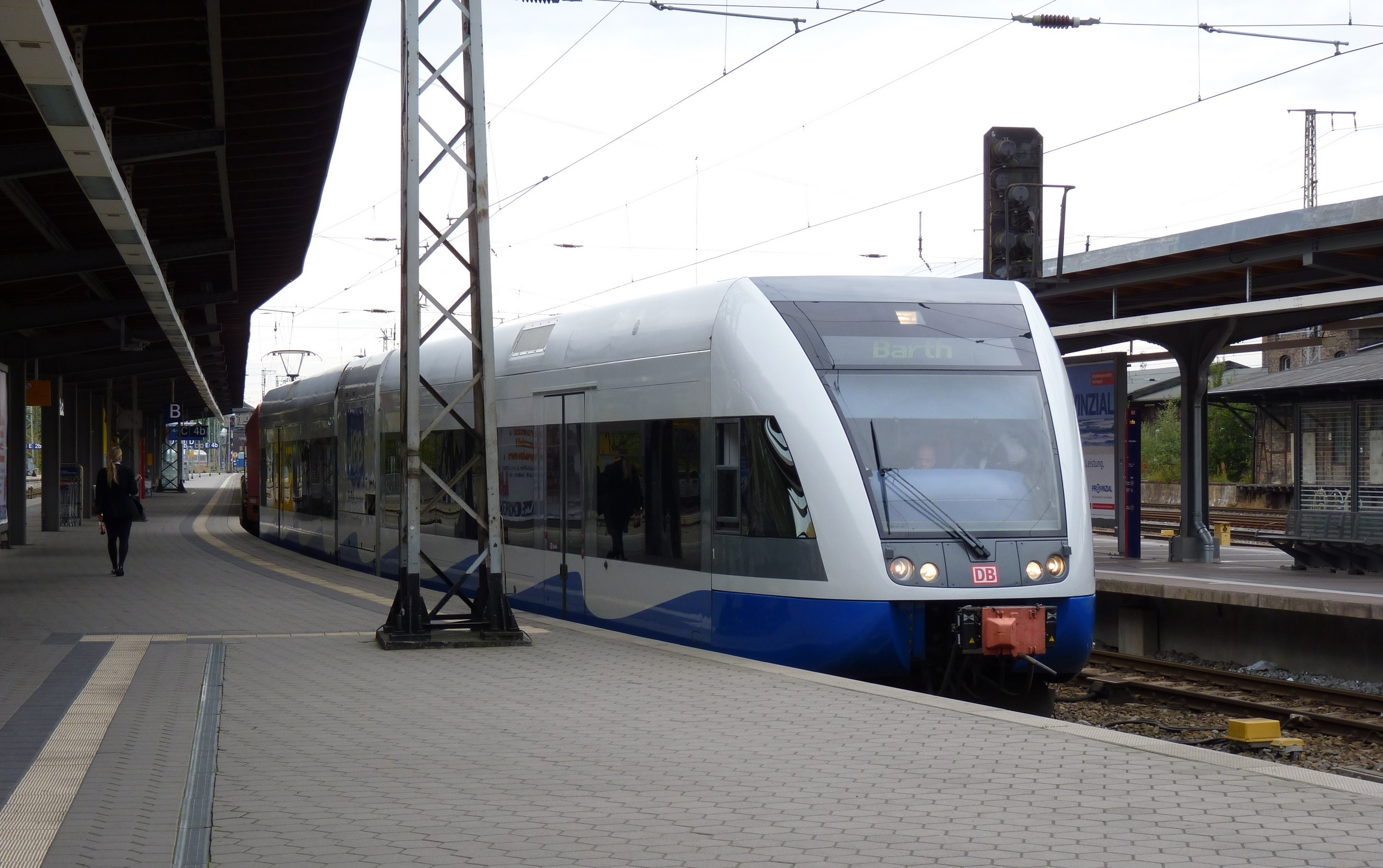 Ein Regional Zug in Richtung Barth steht auf dem Stralsunder Hauptbahnhof